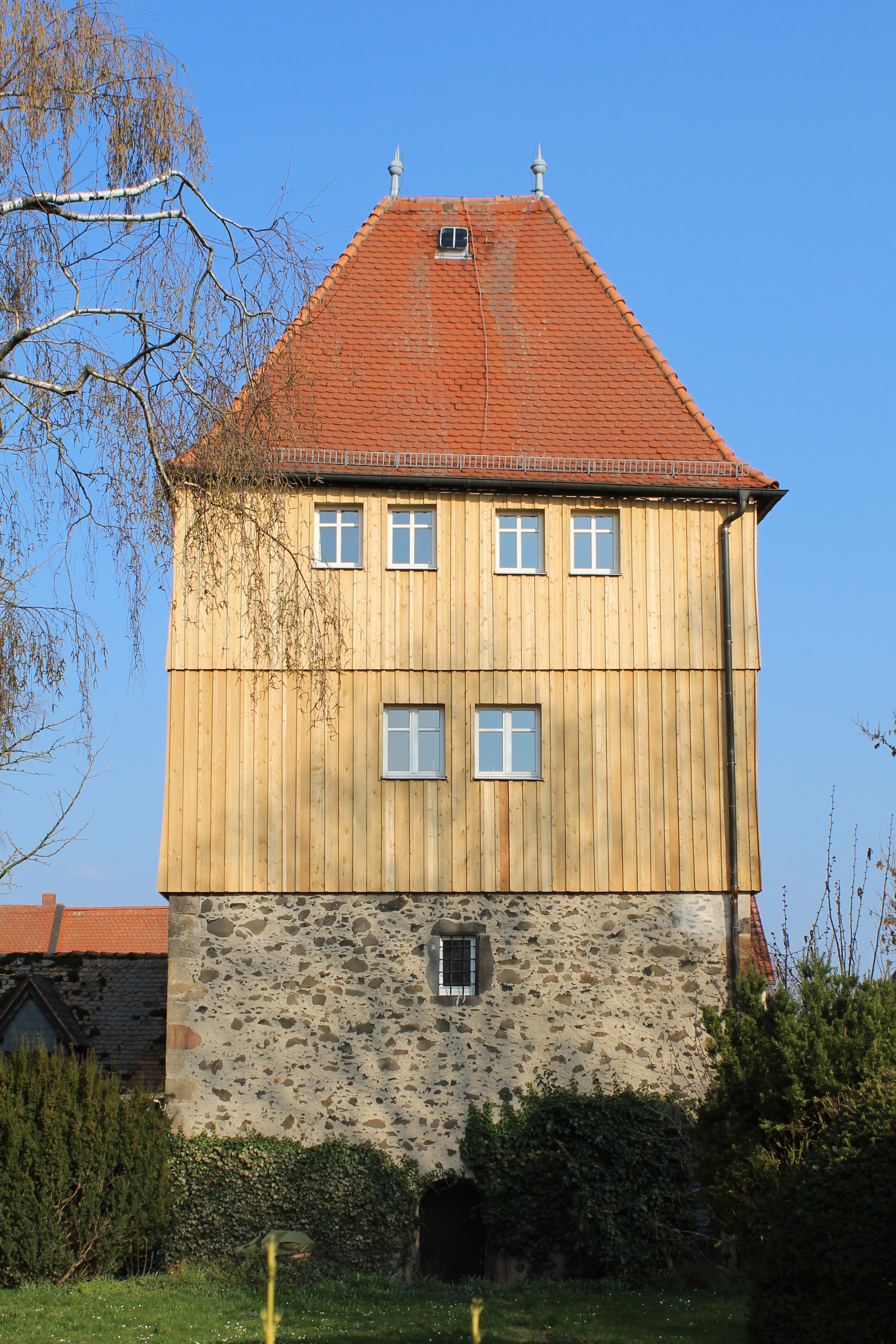 sogenannter Pfortenturm – wehrhafter Speicher aus dem 15. Jahrhundert in Wickstadt, Stadt Niddatal im Wetteraukreis in Hessen.